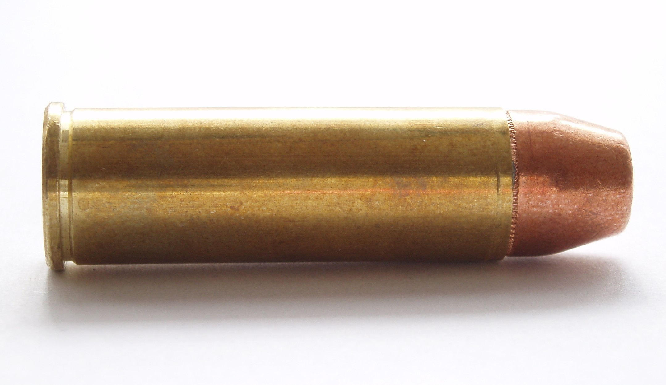 .454 Casull revolver cartrdige.FMJ bullet.